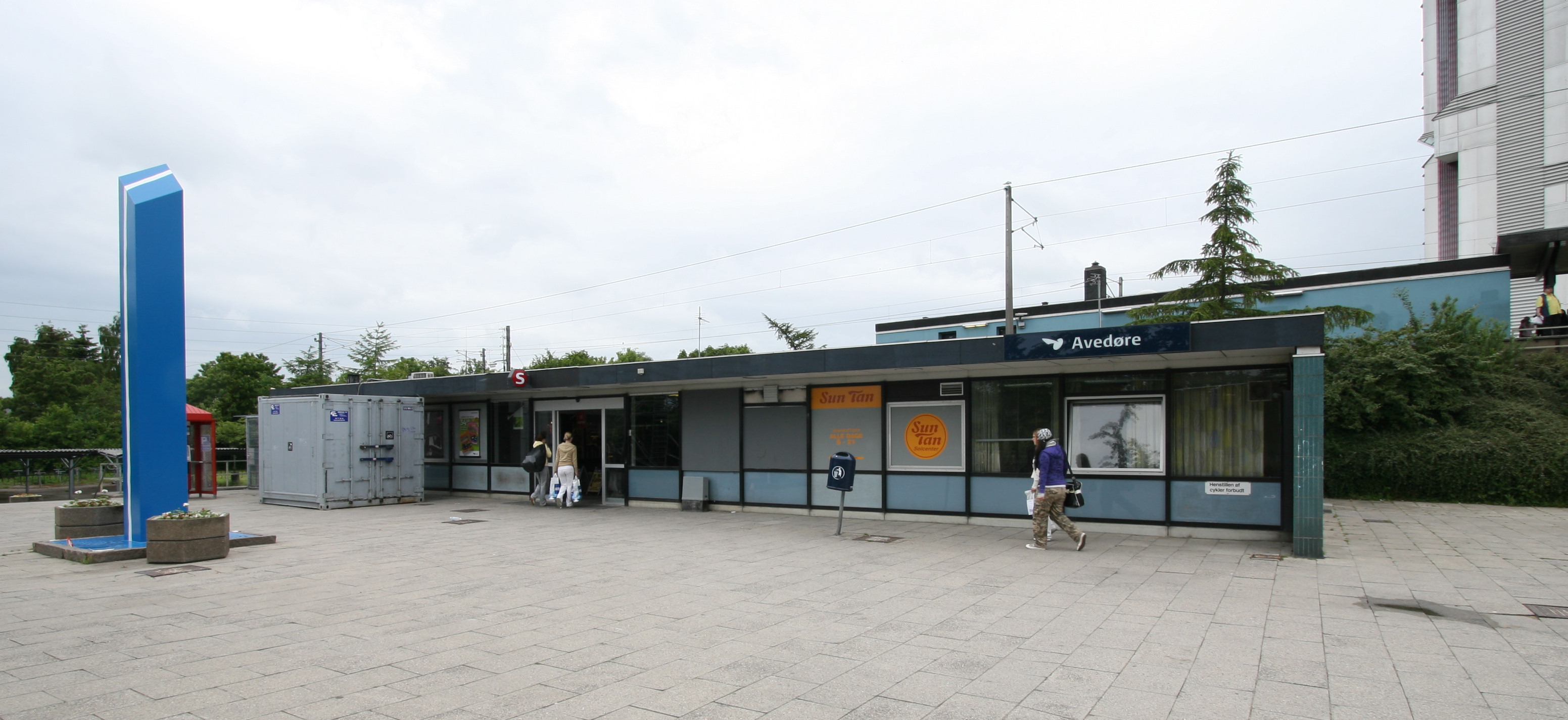 Avedøre S-Train Station, Denmark Stationsplads